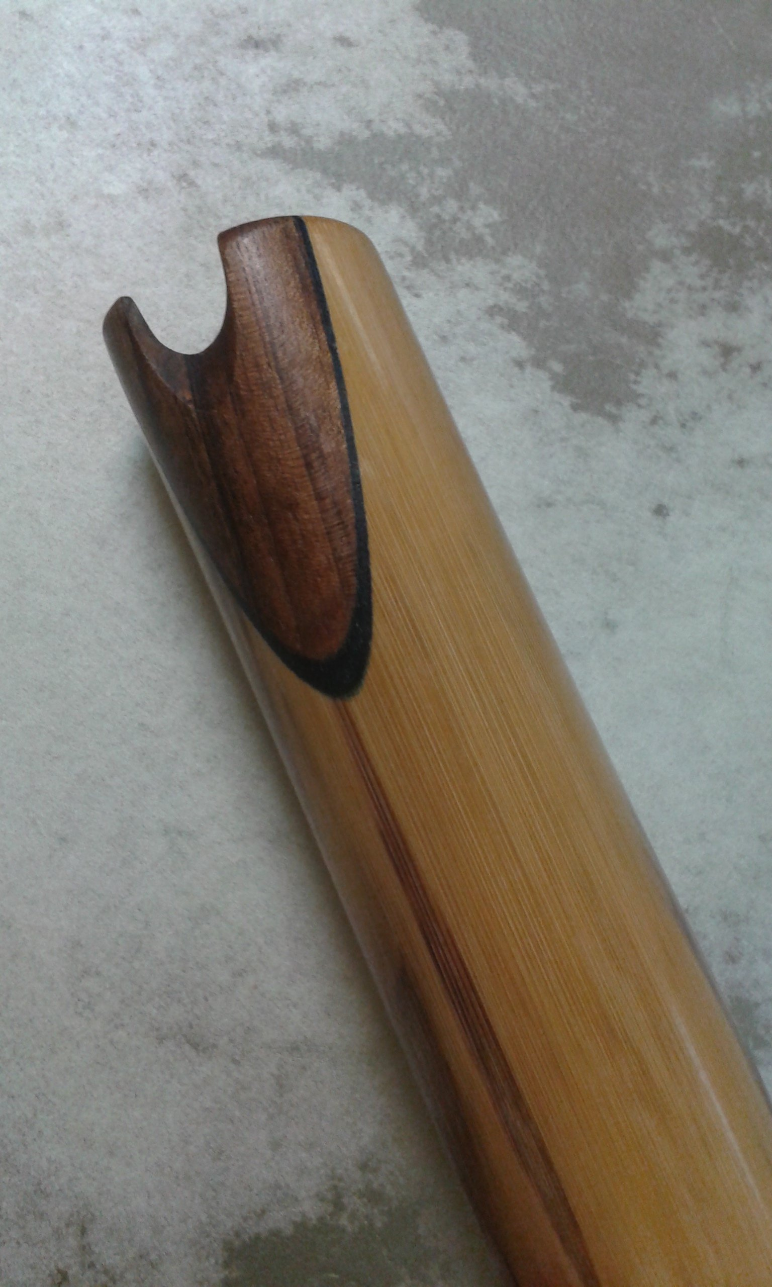 Detalle de la embocadura de una quena de bambú con incrustación de maderas del luthier argentino Ángel Sampedro del Río (Un mundo de bambú).